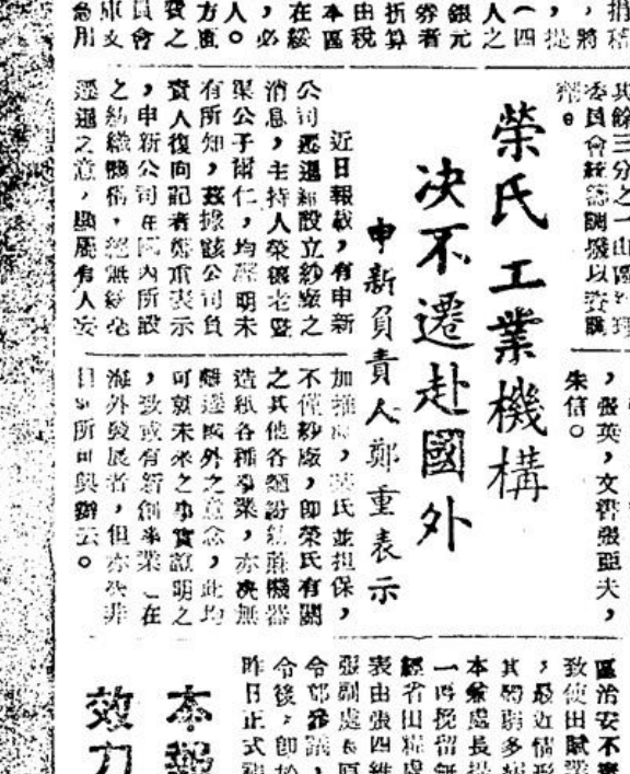 1949.3.15 荣氏工业机构绝不迁赴国外 荣氏家族在《人报》上公布其工业资产不迁移出国